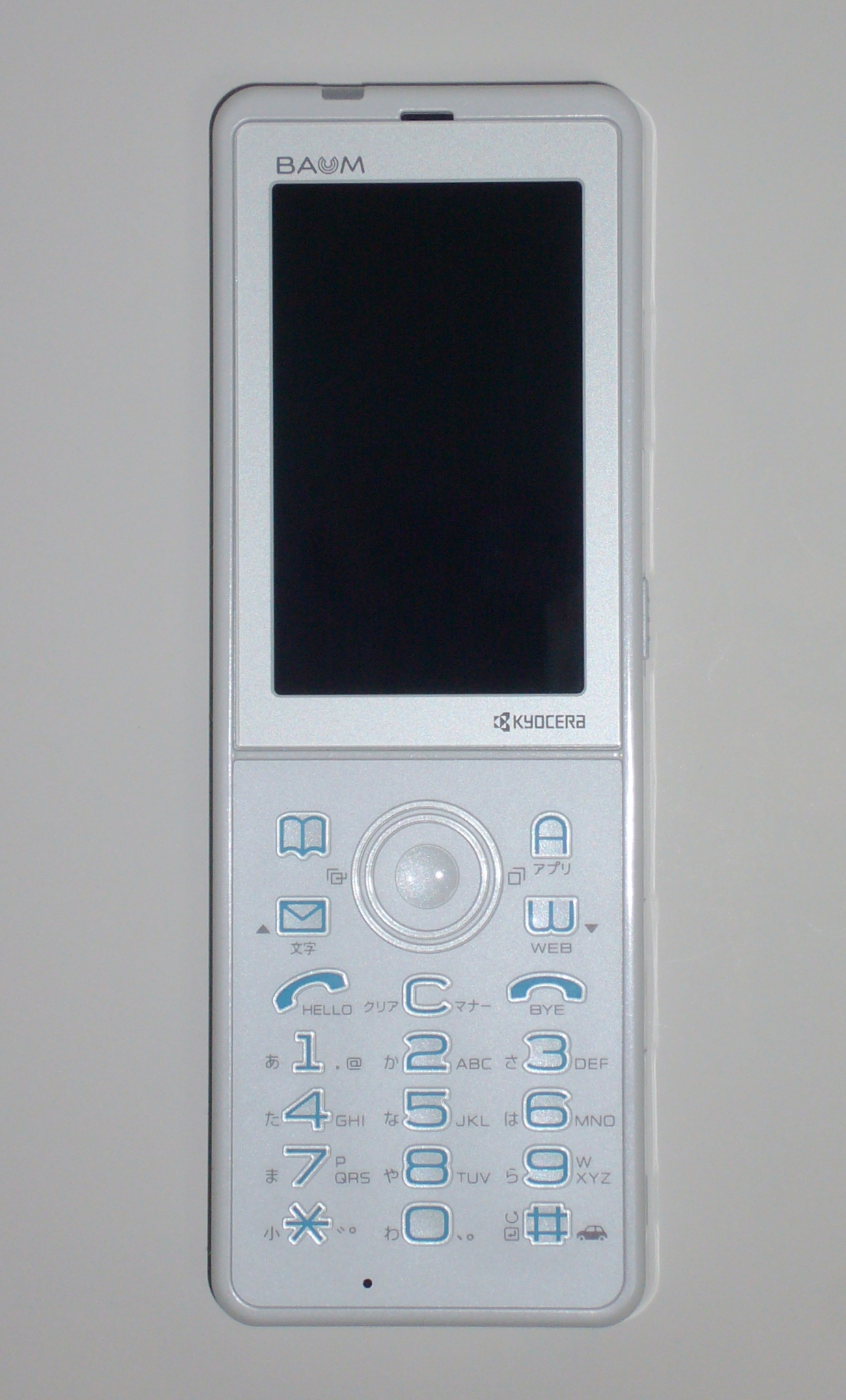 京セラより2009年に発売されたWX341Kの前面画像。